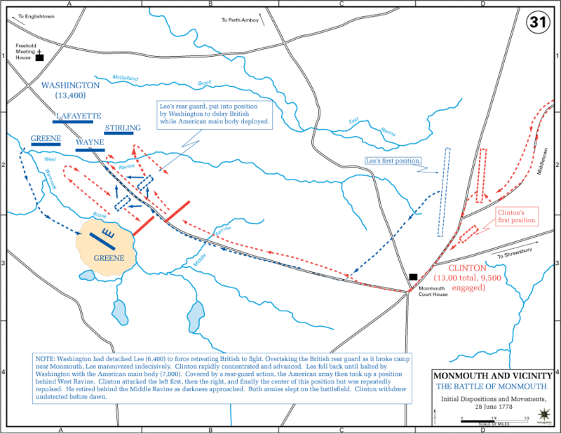 Plattegrond Slag bij Monmouth